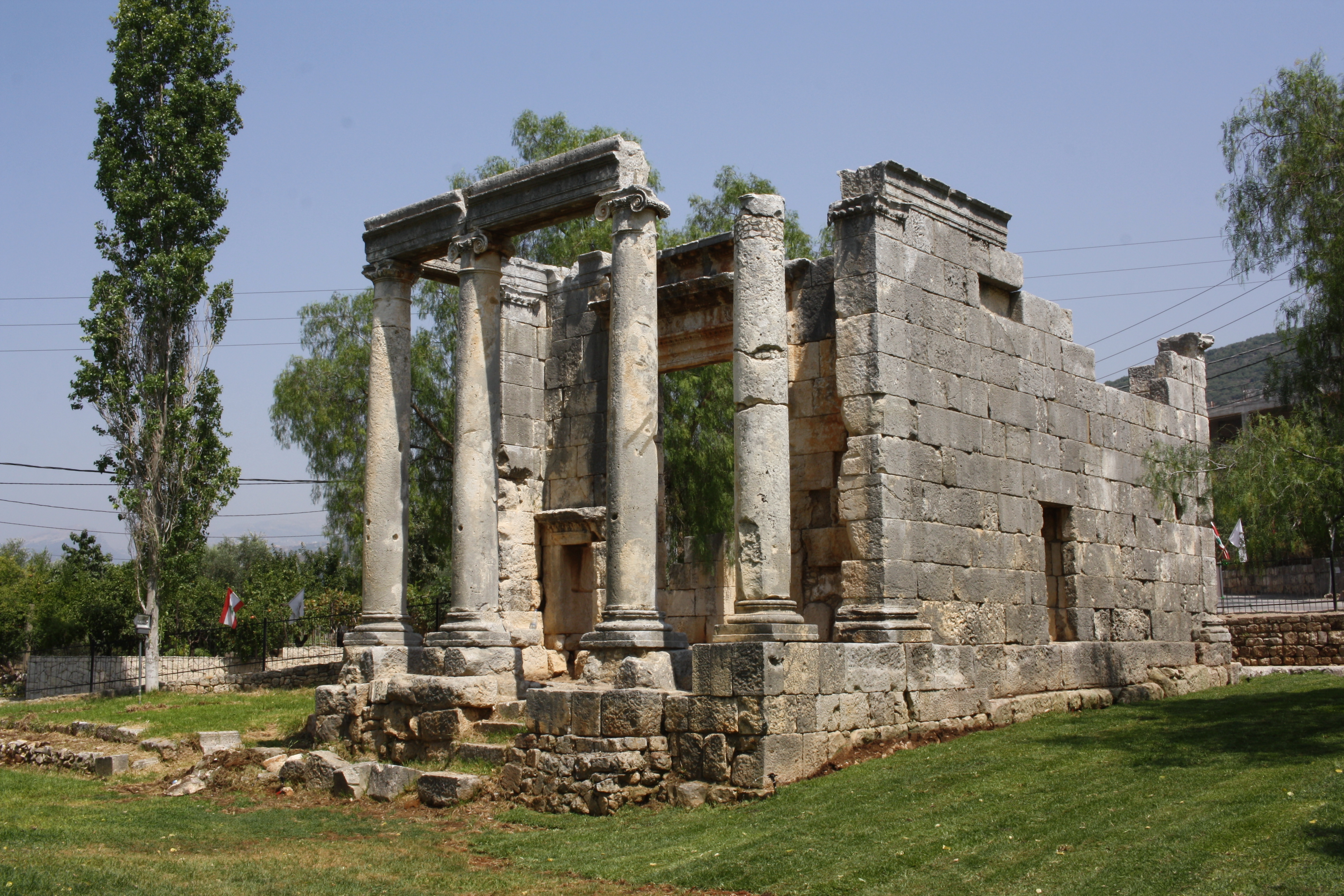 Le temple de Bziza au Liban Nord dans la région de Amioun